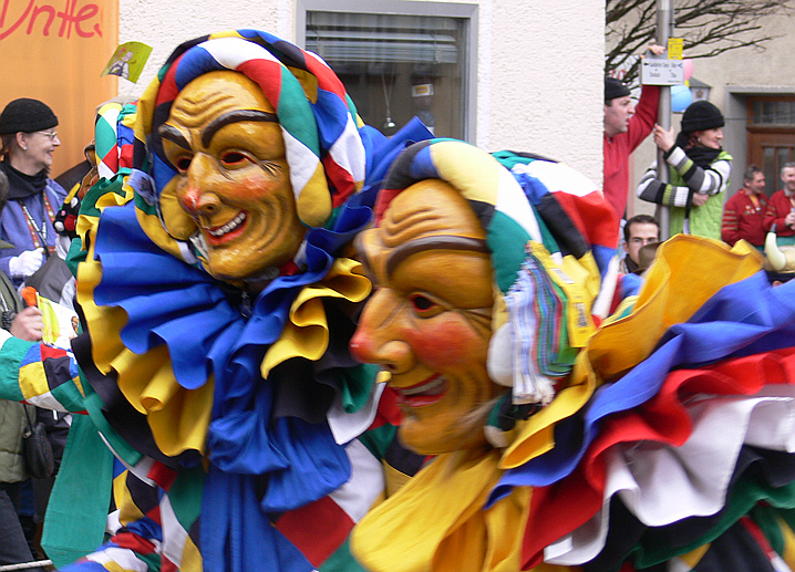 Narrenzunft Tettnang, Figur: Gätterlet Veranstaltung: Narrensprung beim Narrentreffen Meßkirch 2006